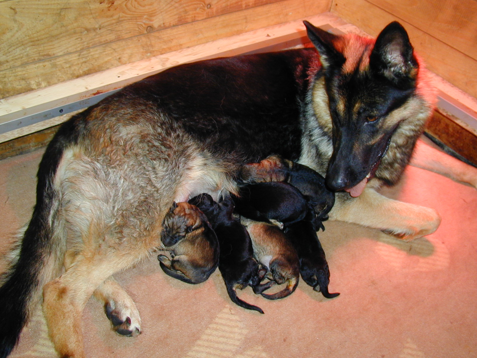 Deutsche Schäferhündin „Fara“ aus der Zuchtstätte „vom Gernkogel“ mit ihren zwei Tage alten Welpen